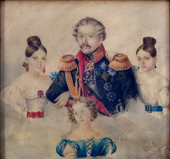 Rosyjski oficer z córkami